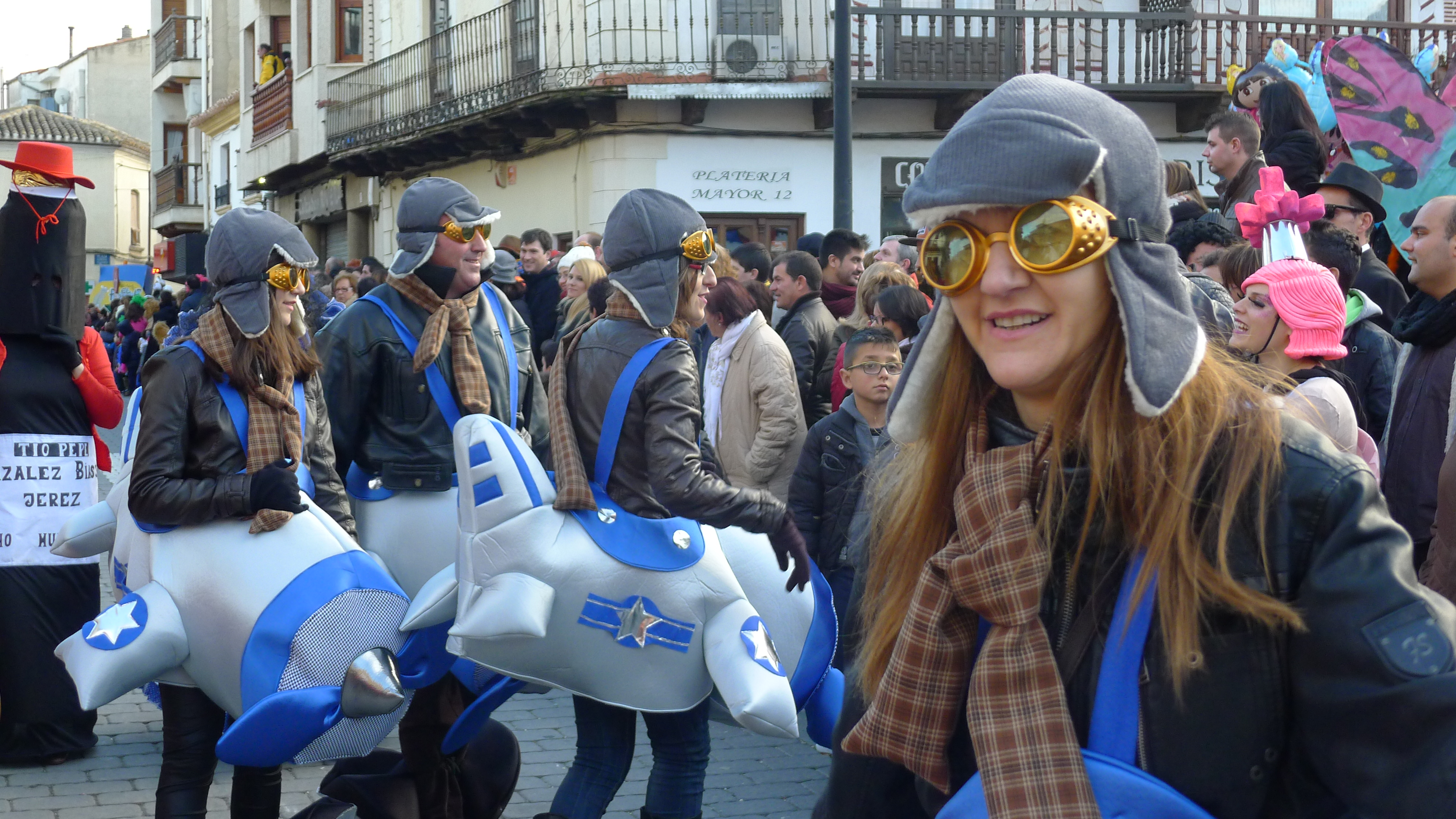 Carnaval 2015